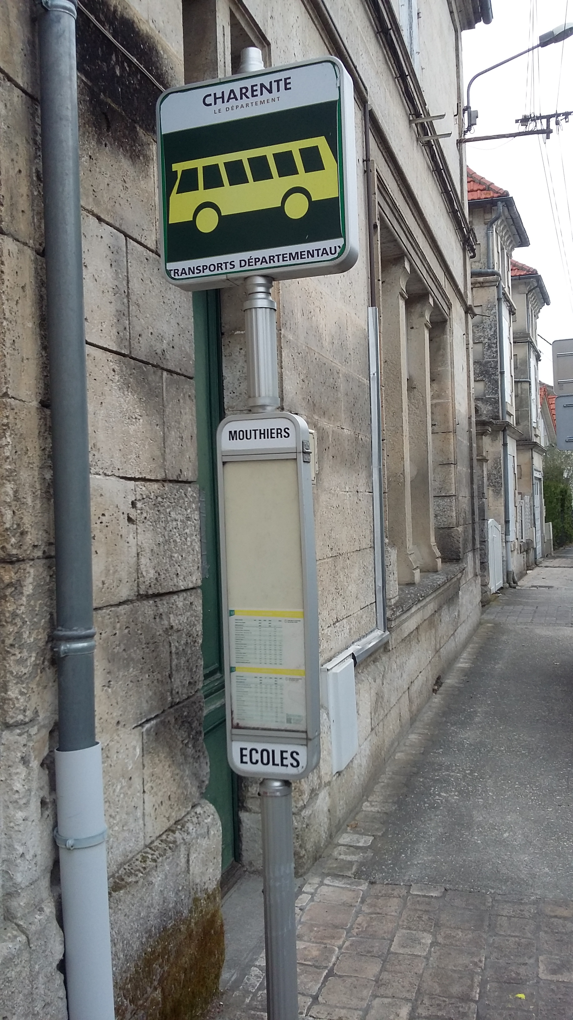 Poteau de l'arrêt "Mouthiers-Crèche" du réseau Cartrans.